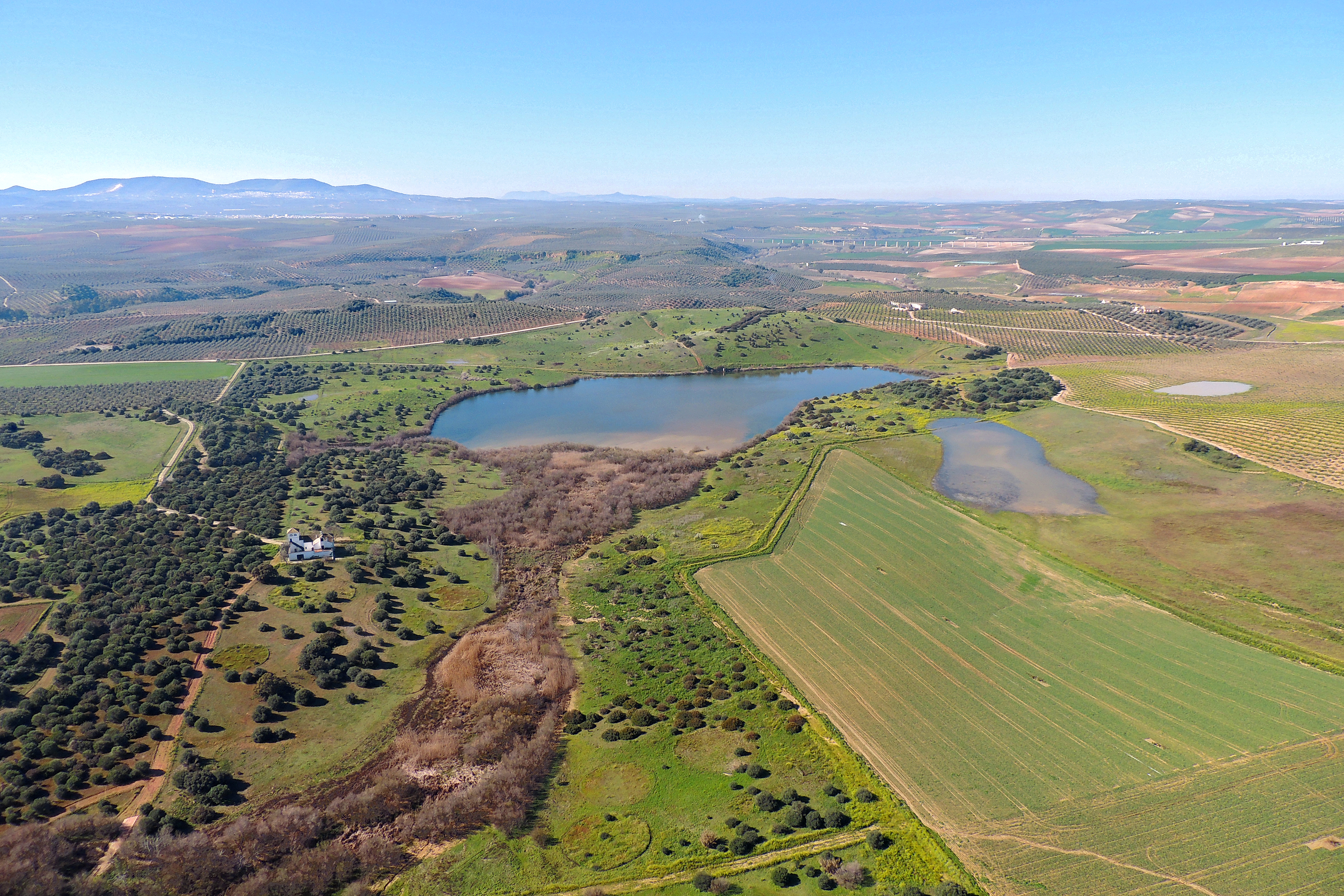 Fotografía aérea del complejo lagunar Tíscar - Comandante - Jiménez - Vega - Anguillas